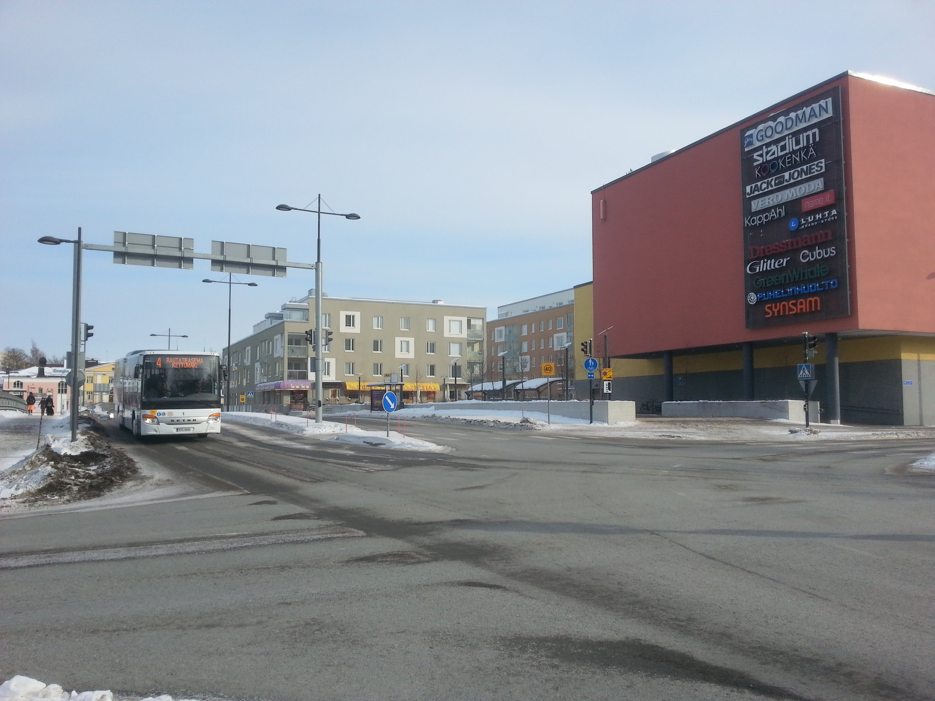 Hämeenlinnan joukkoliikenteen linja-auto numero 4 Turuntiellä kauppakeskus Goodmanin edustalla.